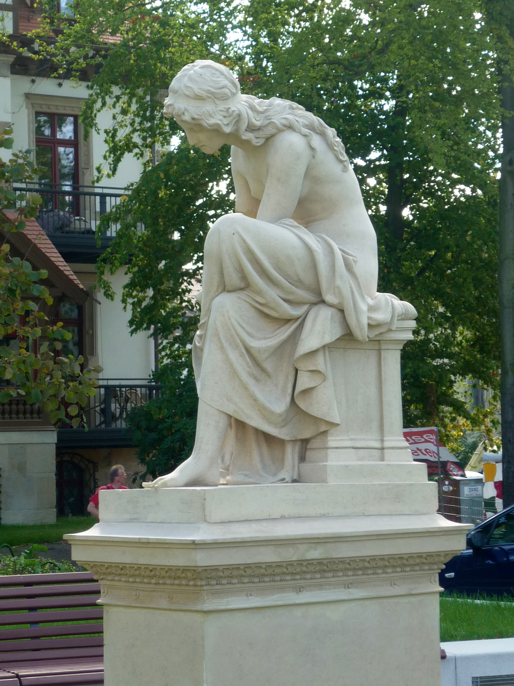 Sandalenbinderin – Skulptur von Ernst Wilhelm Paul (1856–1931) auf dem Gelände des ehemaligen Lahmann-Sanatoriums in Dresden-Weißer Hirsch (um 1890, neu aufgestellt 2016)